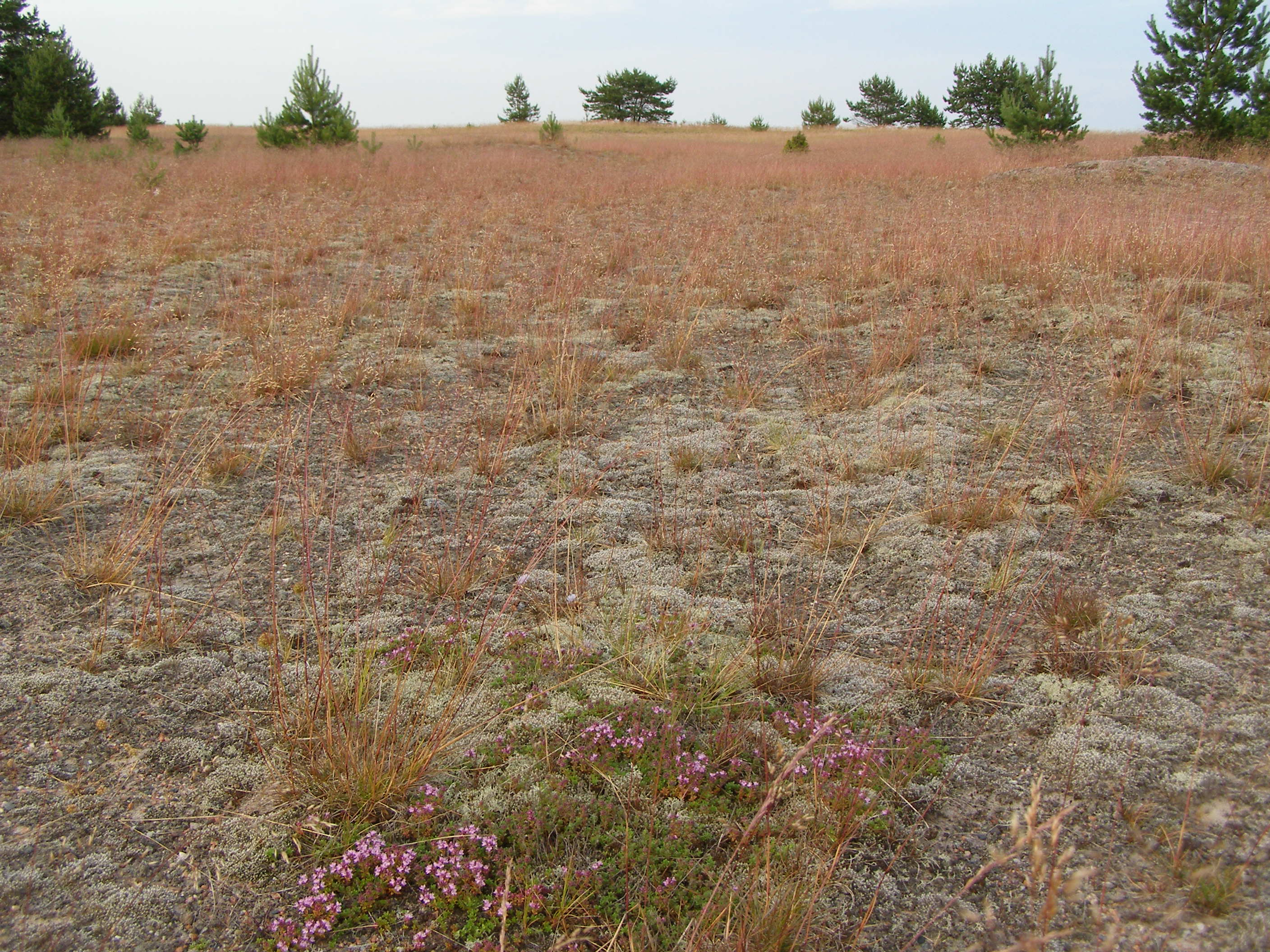 Prangli põhjaosas asuv nõmm